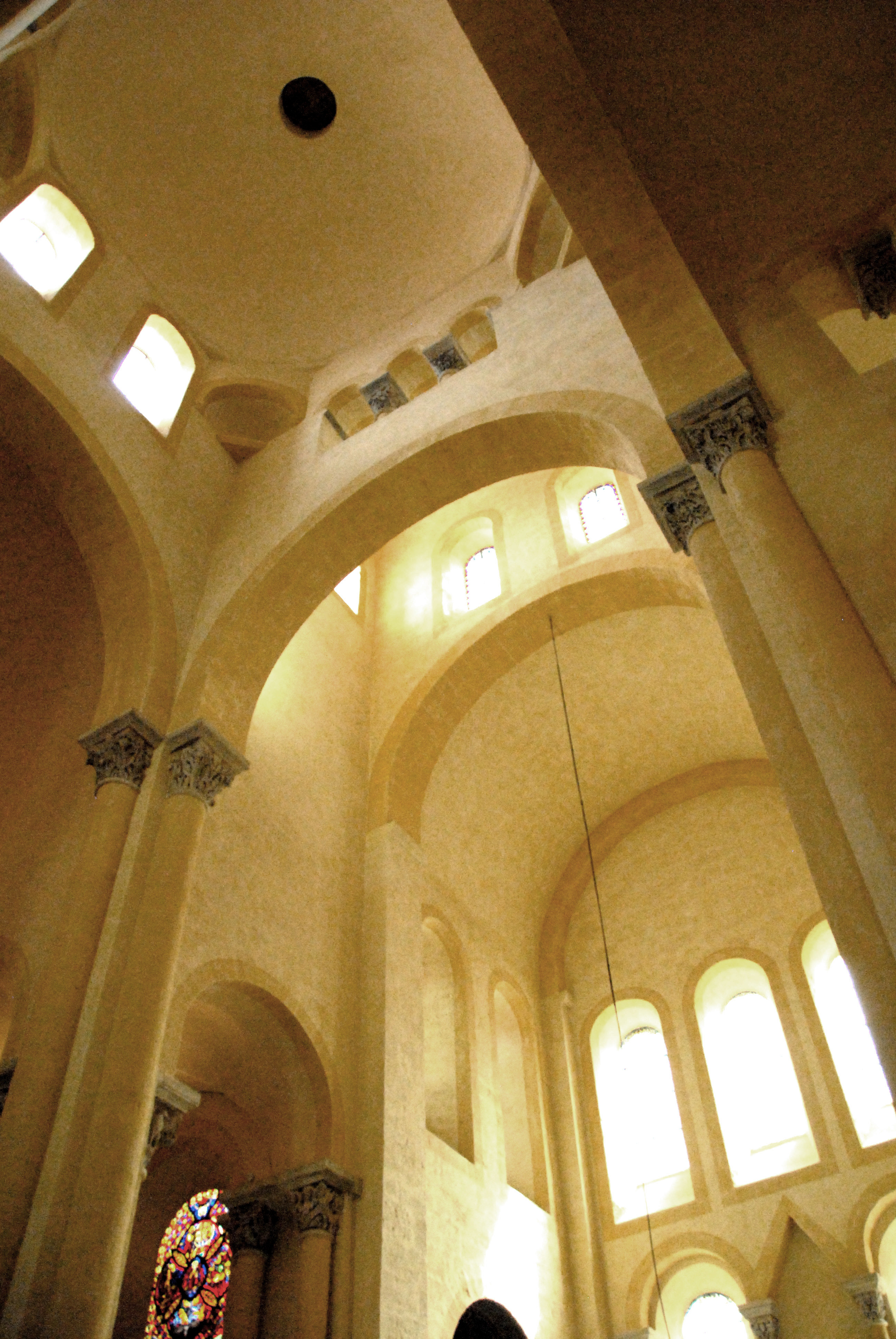 Notre-Dame-du-Port, Vierung und Querhaus